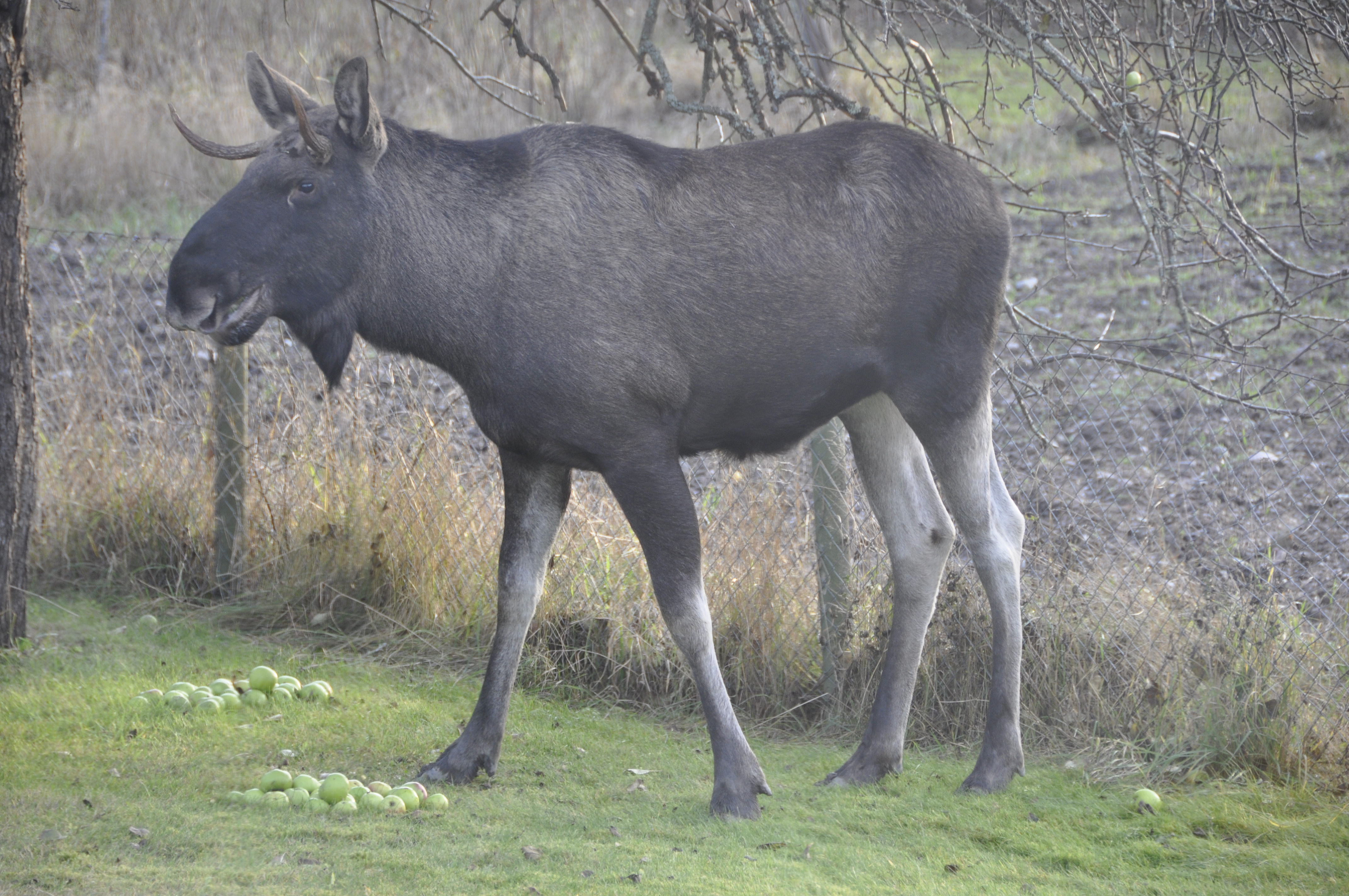 Älg som äter äpplen på en tomt i Kårboda på Ljusterö, Stockholms län, november 2013.